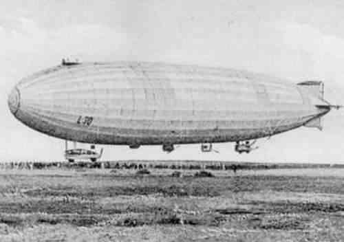 L 30